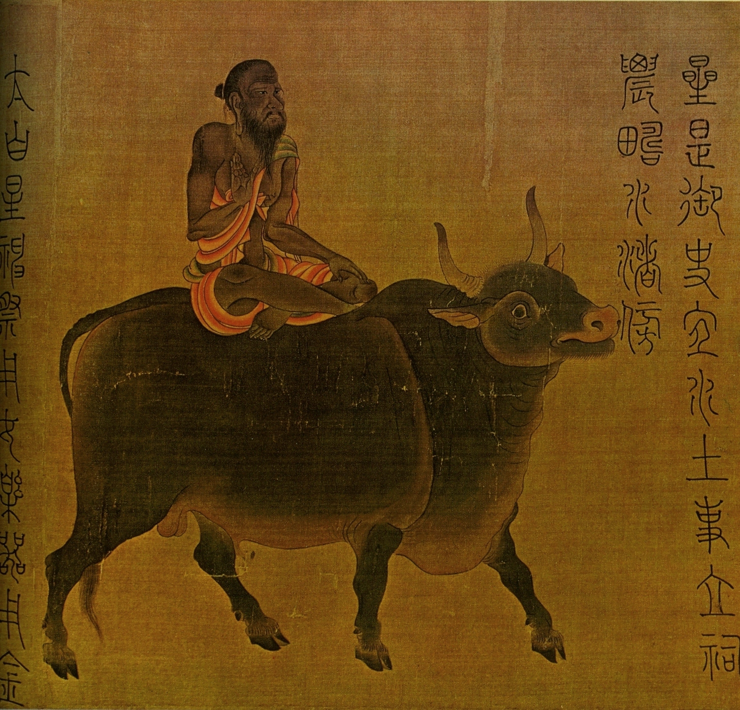 Чжан Сен Яо Сатурн. Деталь. Колл. Абе, Осака